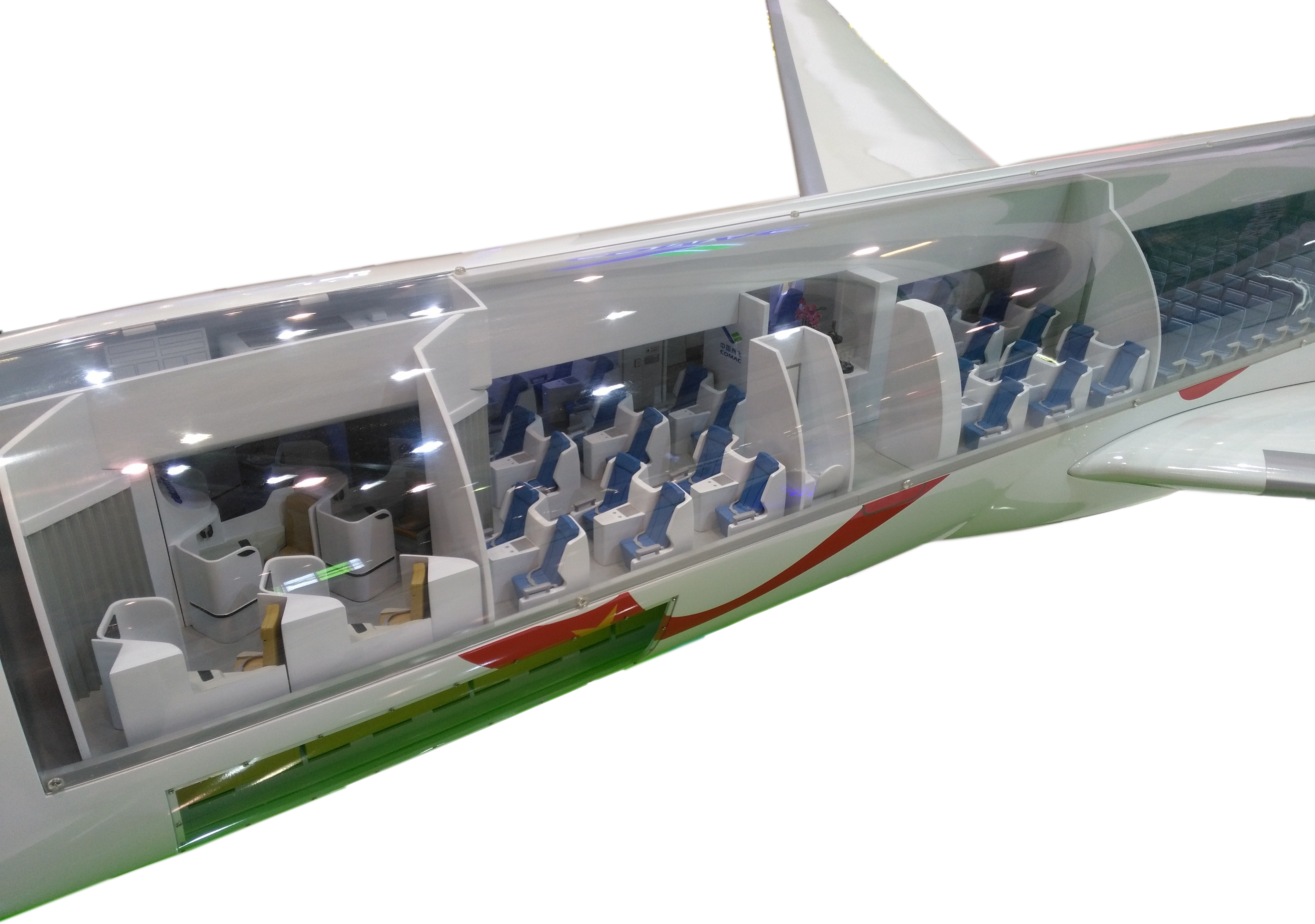 Paris Air Show 2017 Comac C929